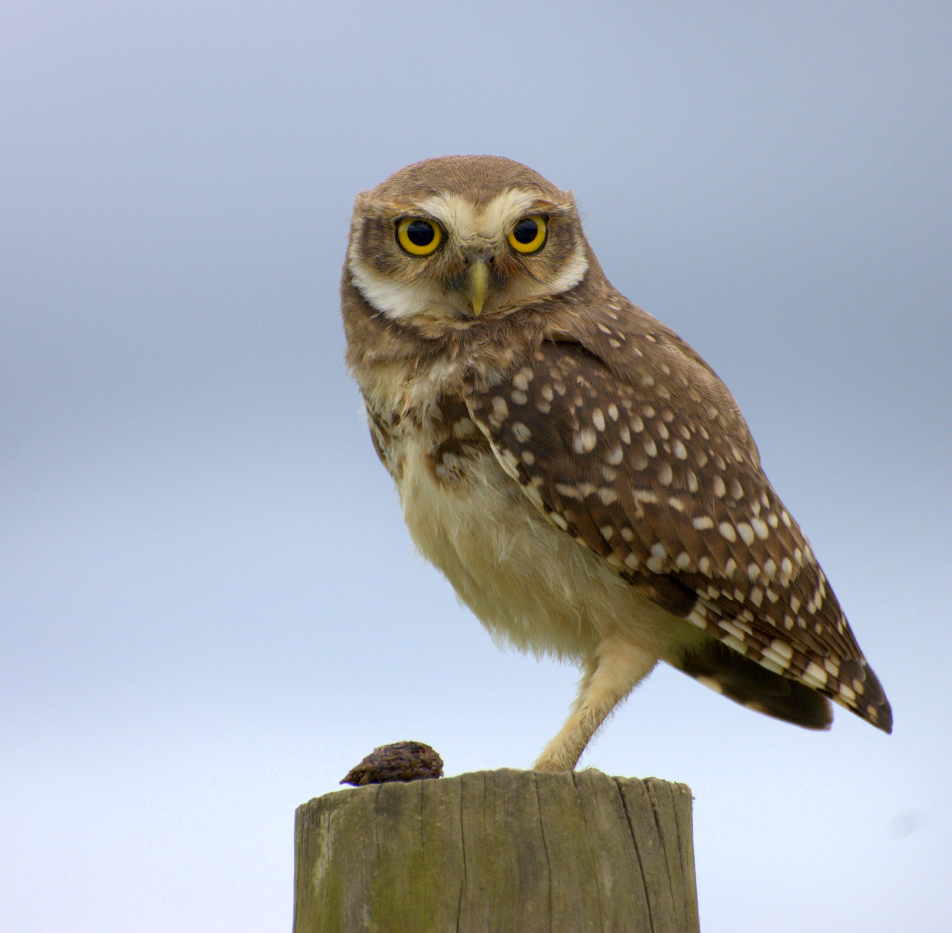 Vale do Ribeira, Registro-SP